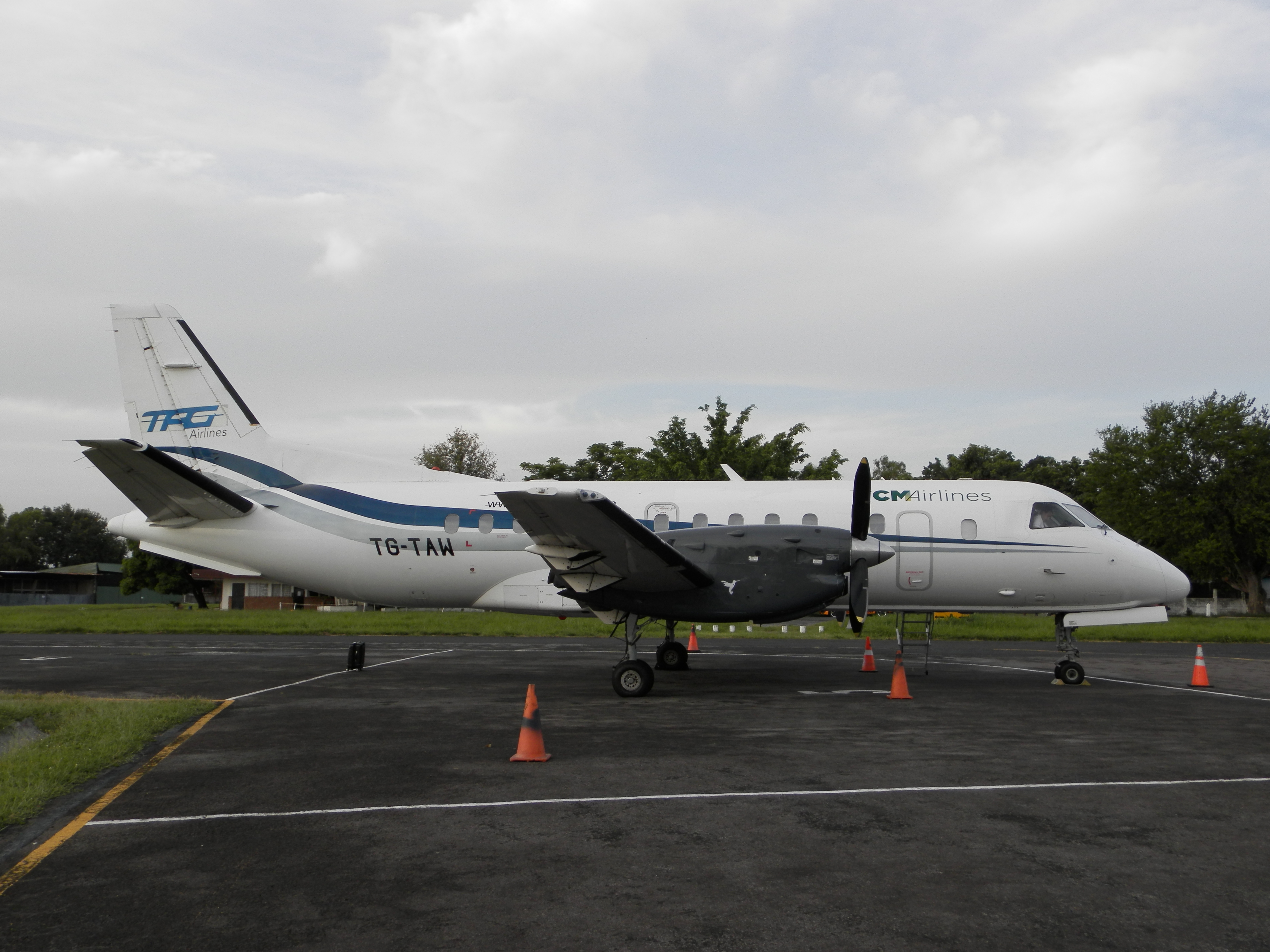 Avión de TAG Airlines